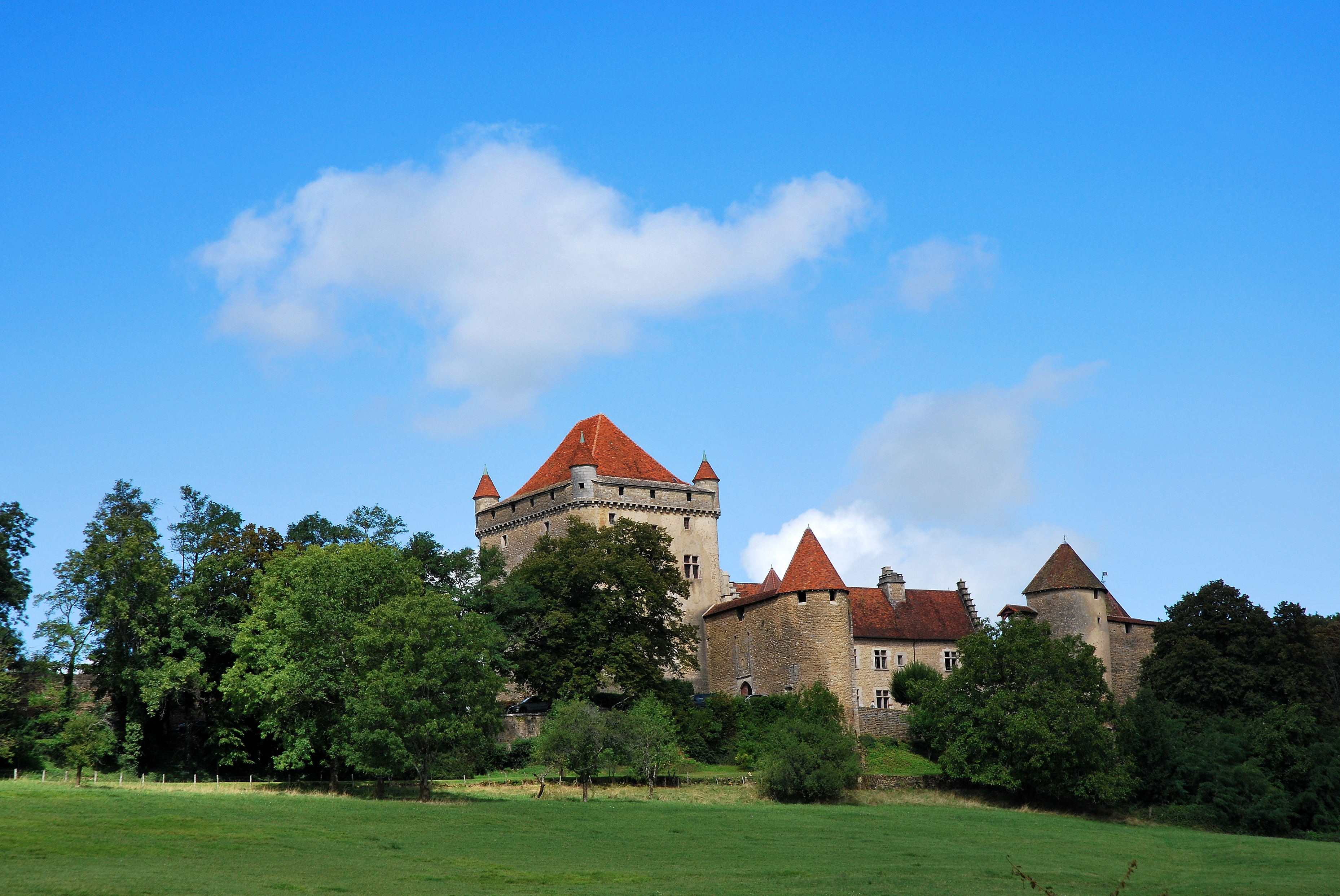 le château du PIn